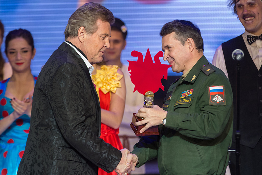 Песня «День Победы» признана лучшей песней о войне на фестивале «Катюша». Приз народному артисту вручает начальник главного управления по работе с личным составом Минобороны РФ генерал-майор Михаил Смыслов.